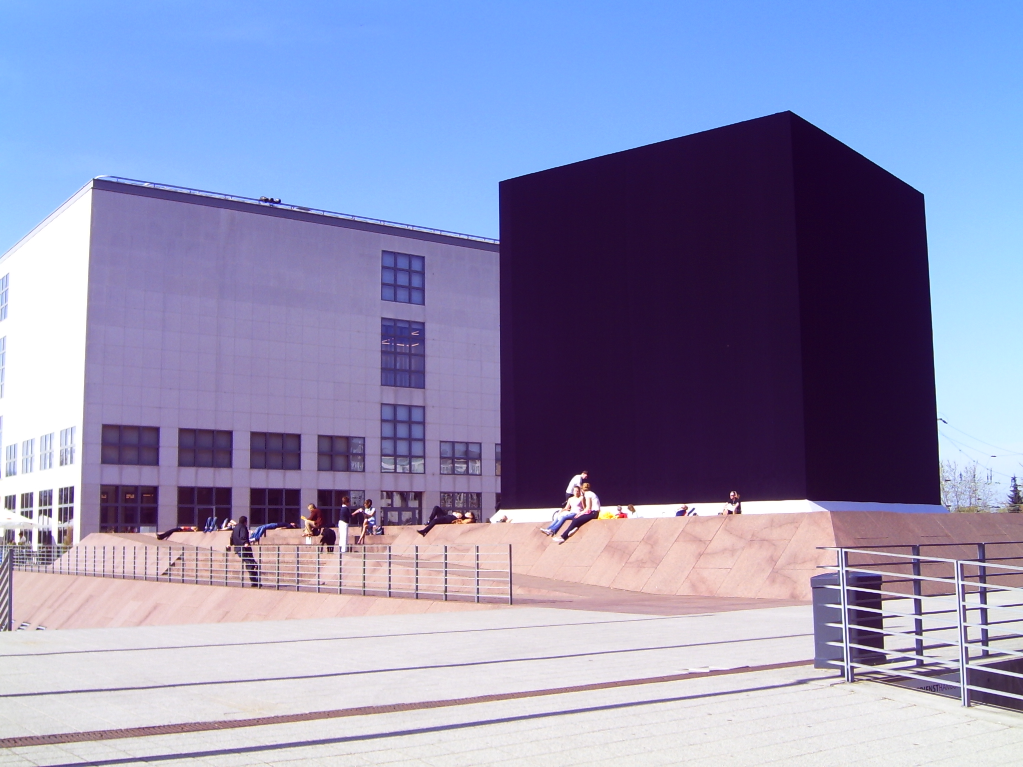 "Das schwarze Quadrat" von Gregor Schneider neben der Galerie der Gegenwart in Hamburg. Eigenes Foto von W.Wacker aus Hamburg [1]